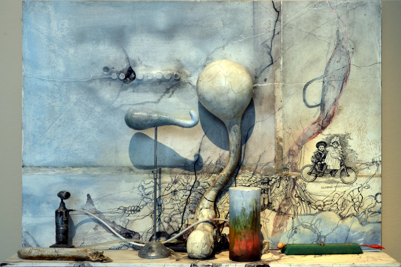 Bedřich Dlouhý, Pocta sobě I. (2012), kombinovaná technika